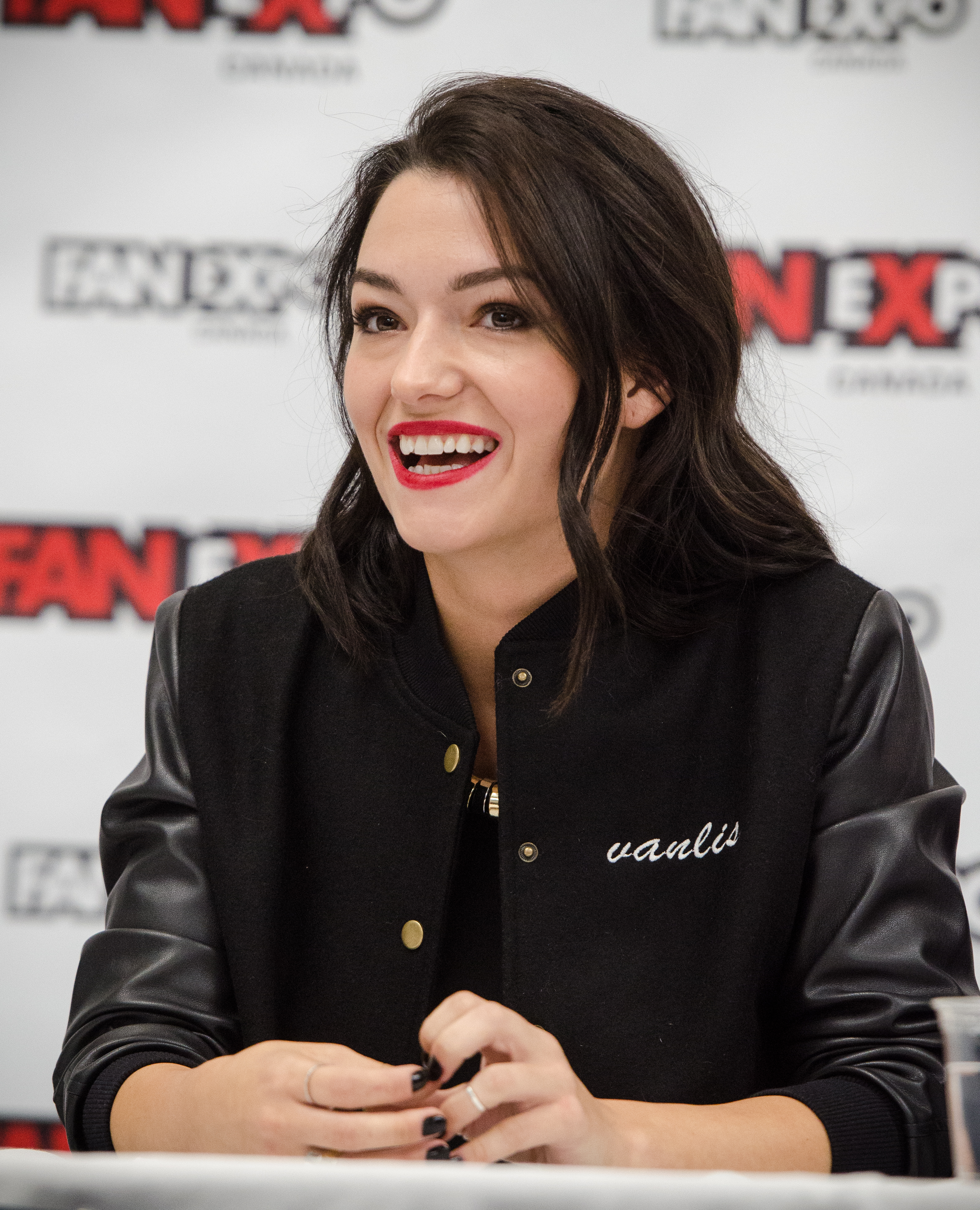 Natasha Negovanlis [10]